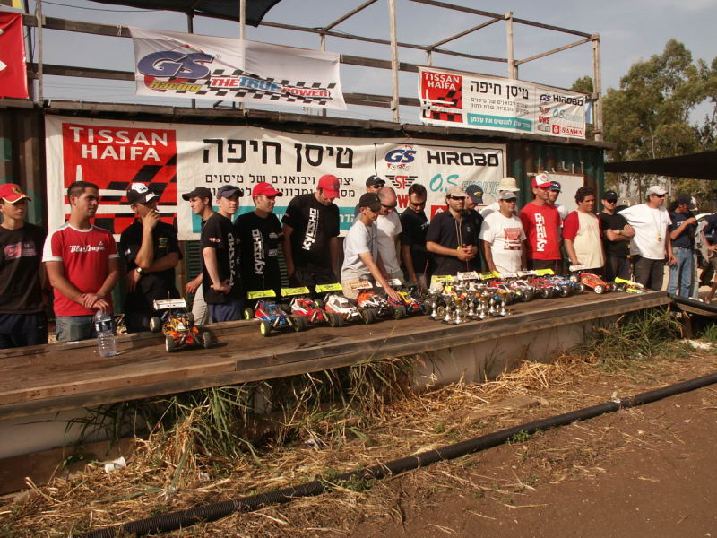 מירוץ אנדורנס בהוט ווילס